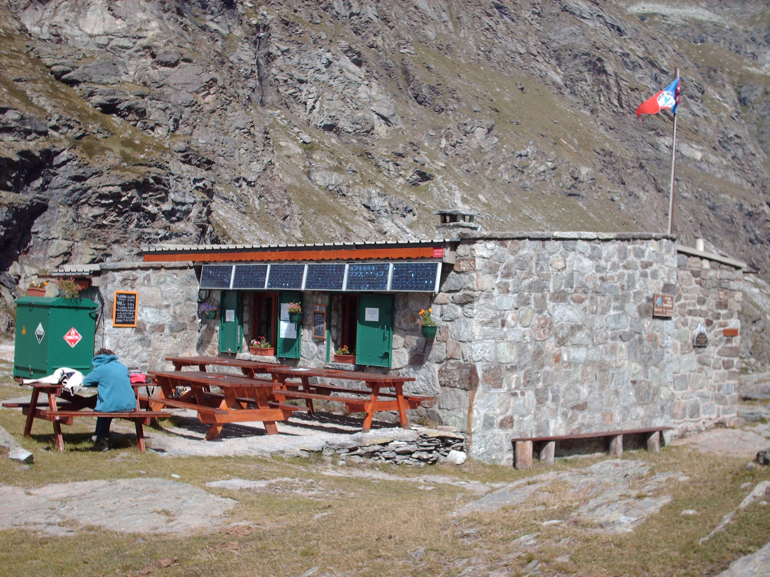 Vue du Refuge d'Ambin 2270m